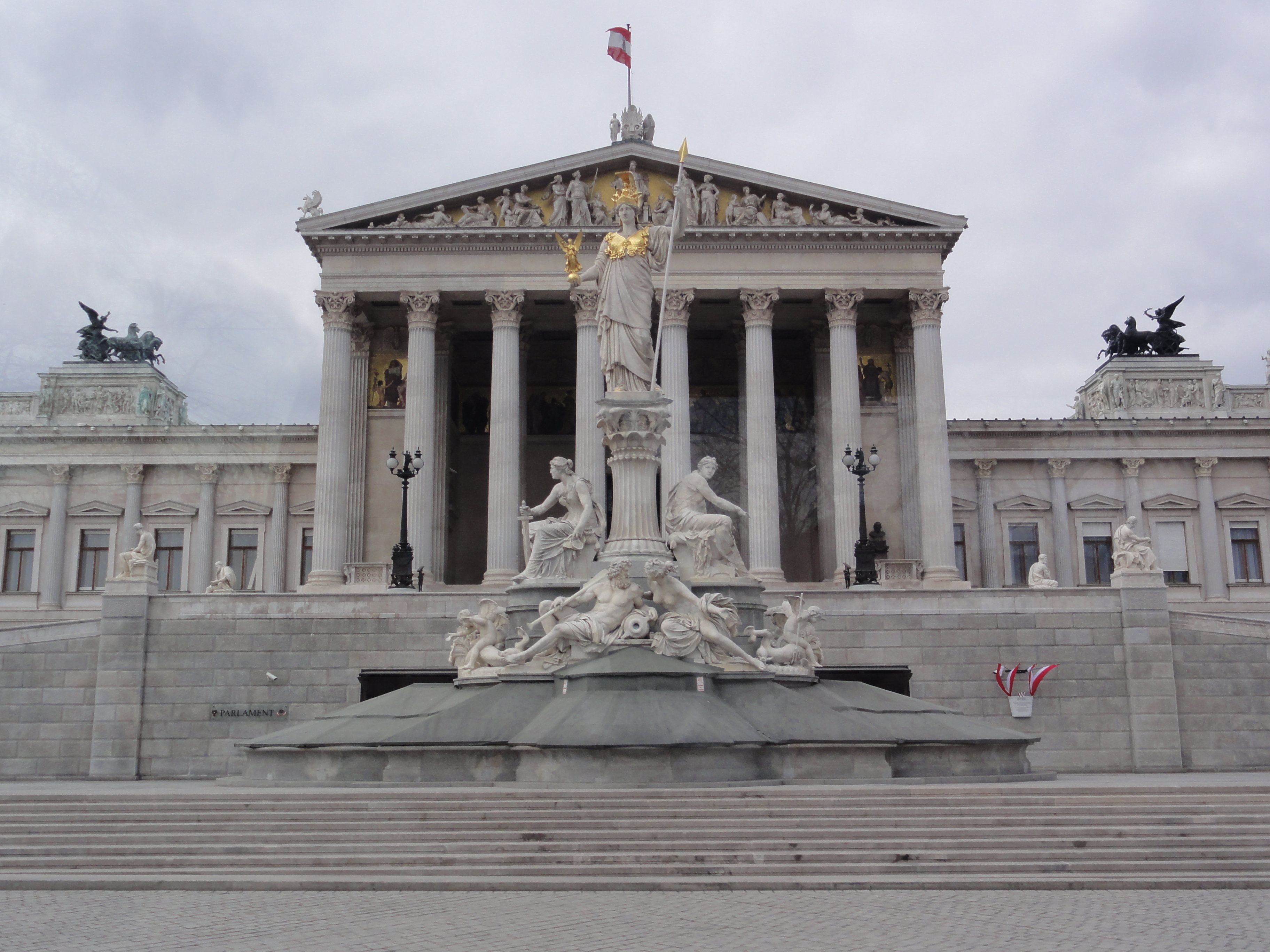 Parlament